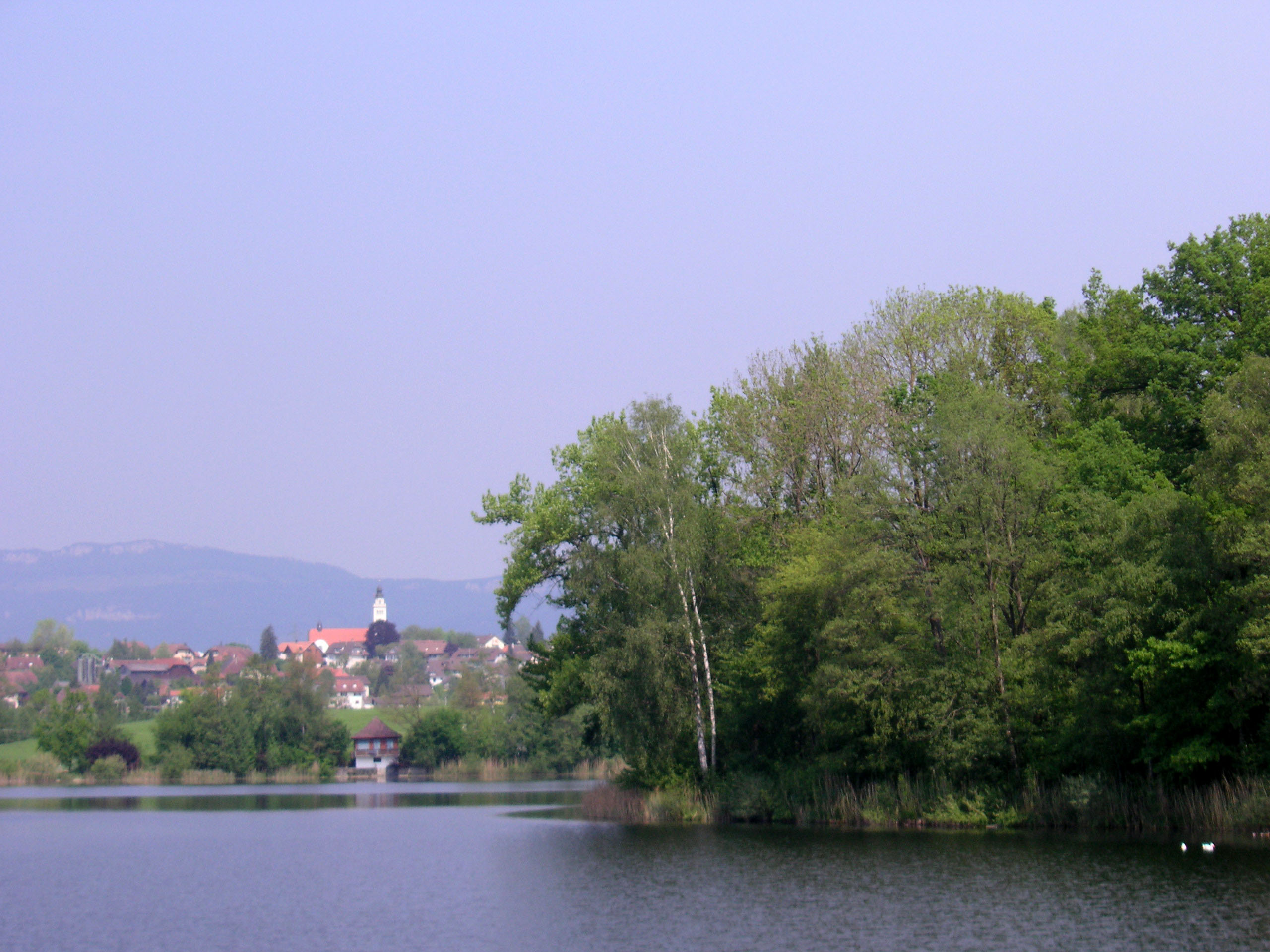 Aeschisee mit Dorf Aeschi